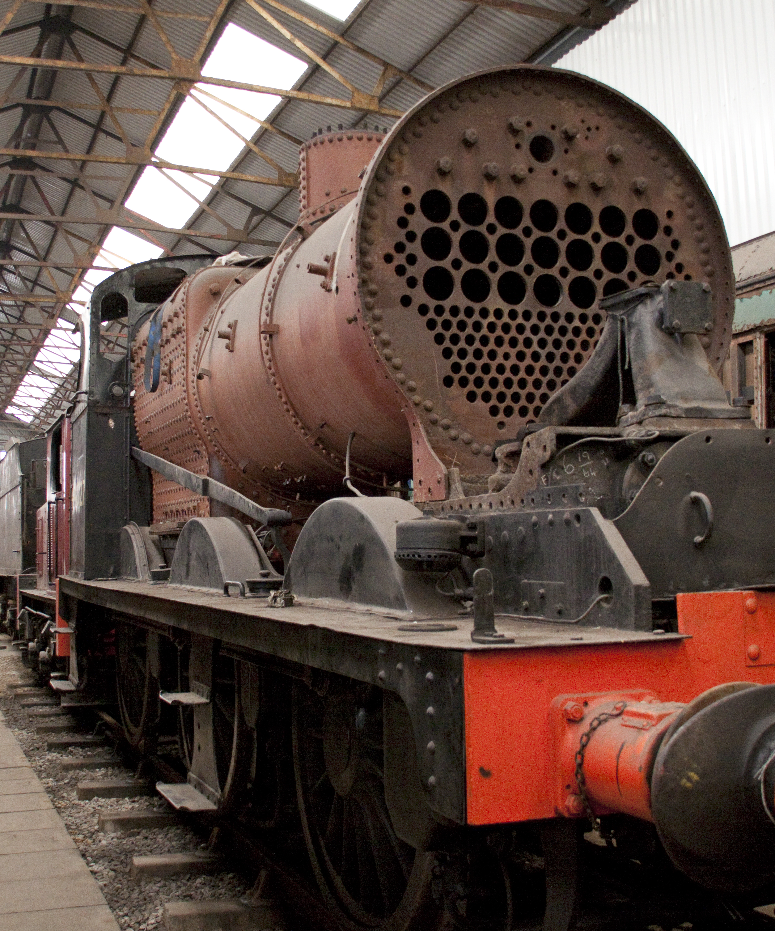 44027 4F